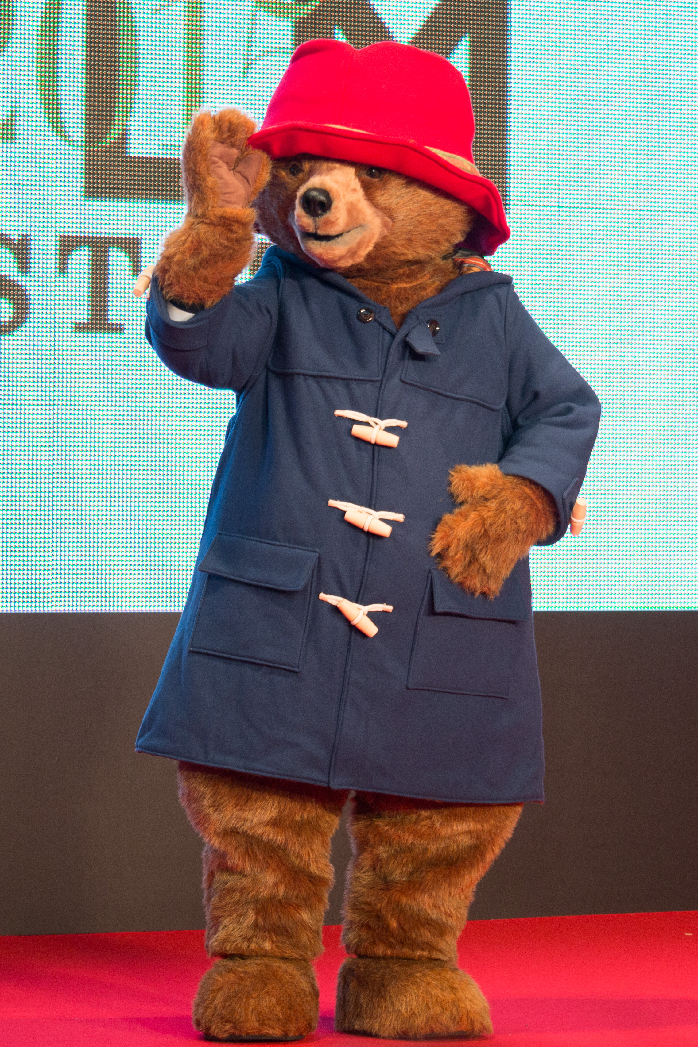 第28回 東京国際映画祭 オープニングセレモニー パディントン (パディントン)